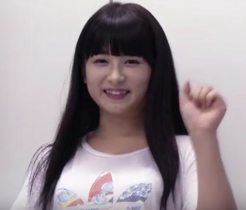 平野もえです。